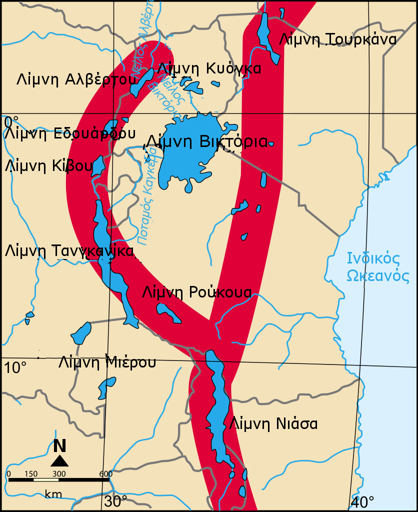 Η περιοχή της Λίμνης Βικτόρια